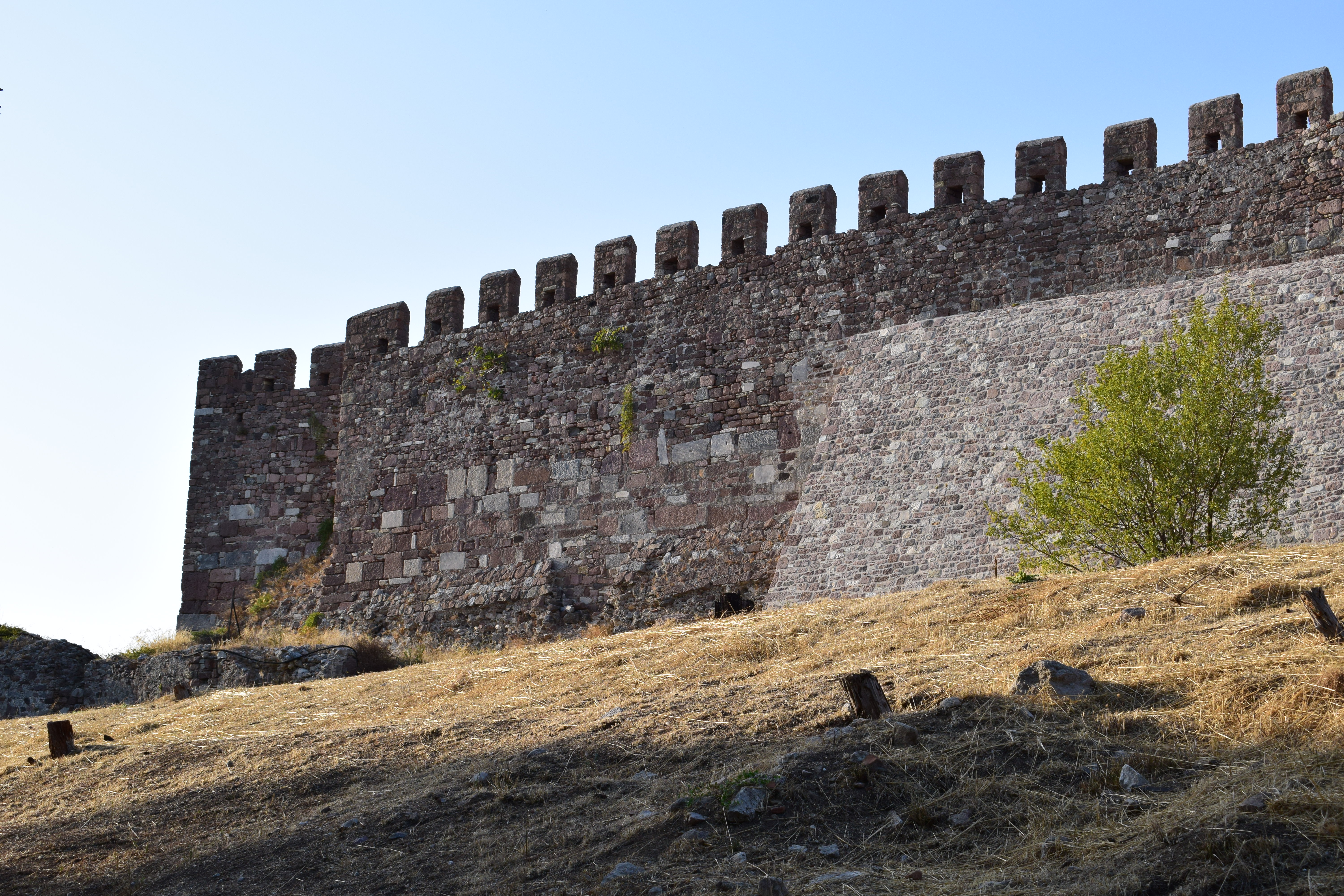 Κάστρο Μυτιλήνης«Κάστρο Μυτιλήνης»